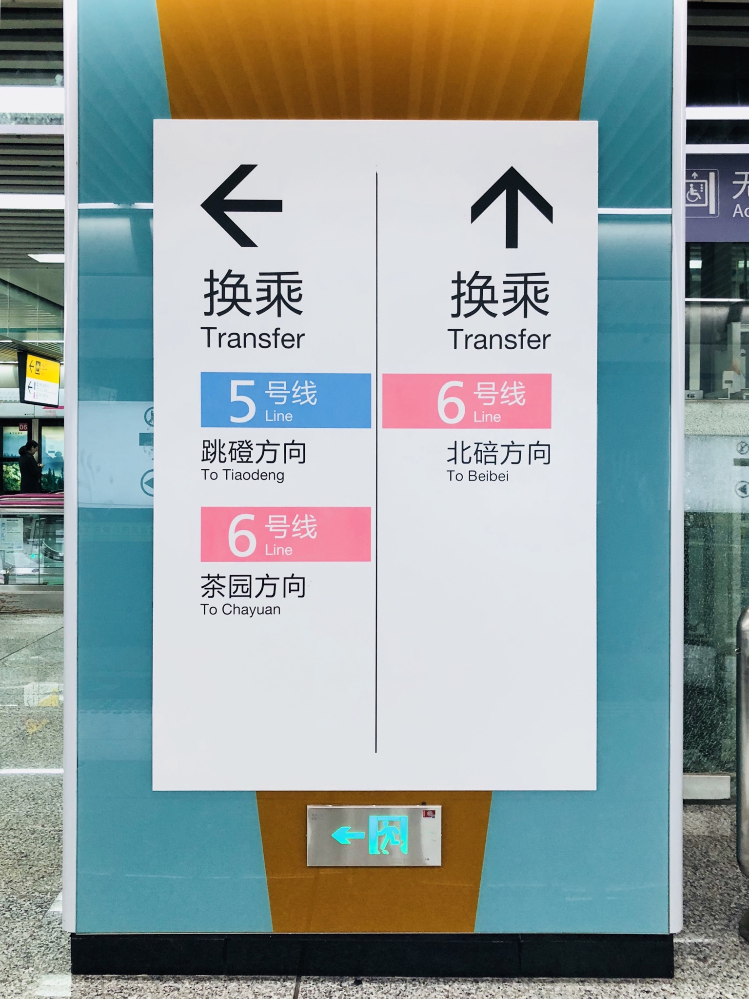 中文（中国大陆）: 5、6号线冉家坝站换乘标识